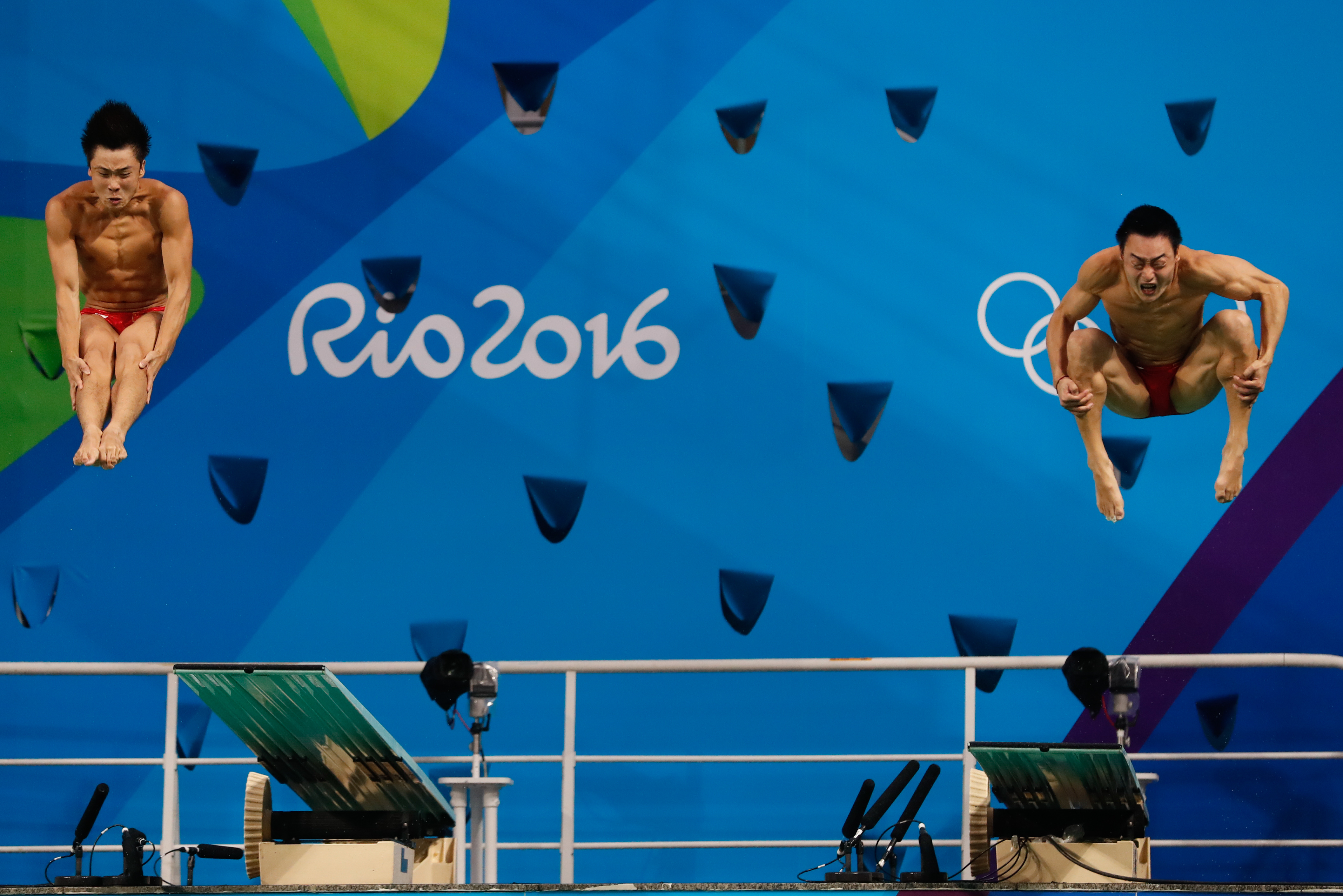 Rio de Janeiro - Chineses Yuan Cao e Kai Qin levam bronze no trampolim de 3 metros sincronizado dos saltos ornamentais nos Jogos Olímpicos Rio 2016, no Parque Aquático Maria Lenk (Fernando Frazão/Agência Brasil)